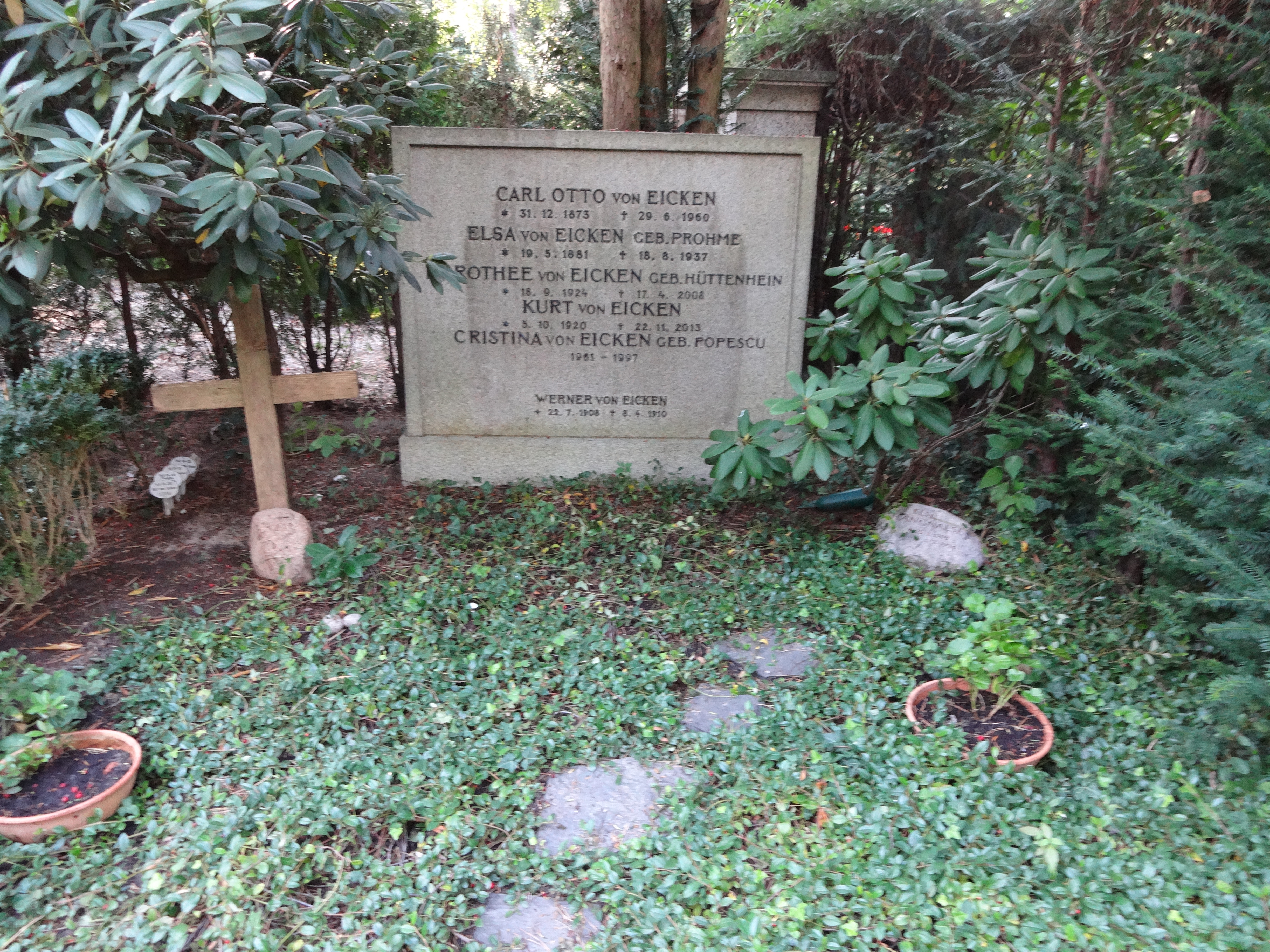 Grab von Carl Otto von Eicken auf dem Waldfriedhof Dahlem